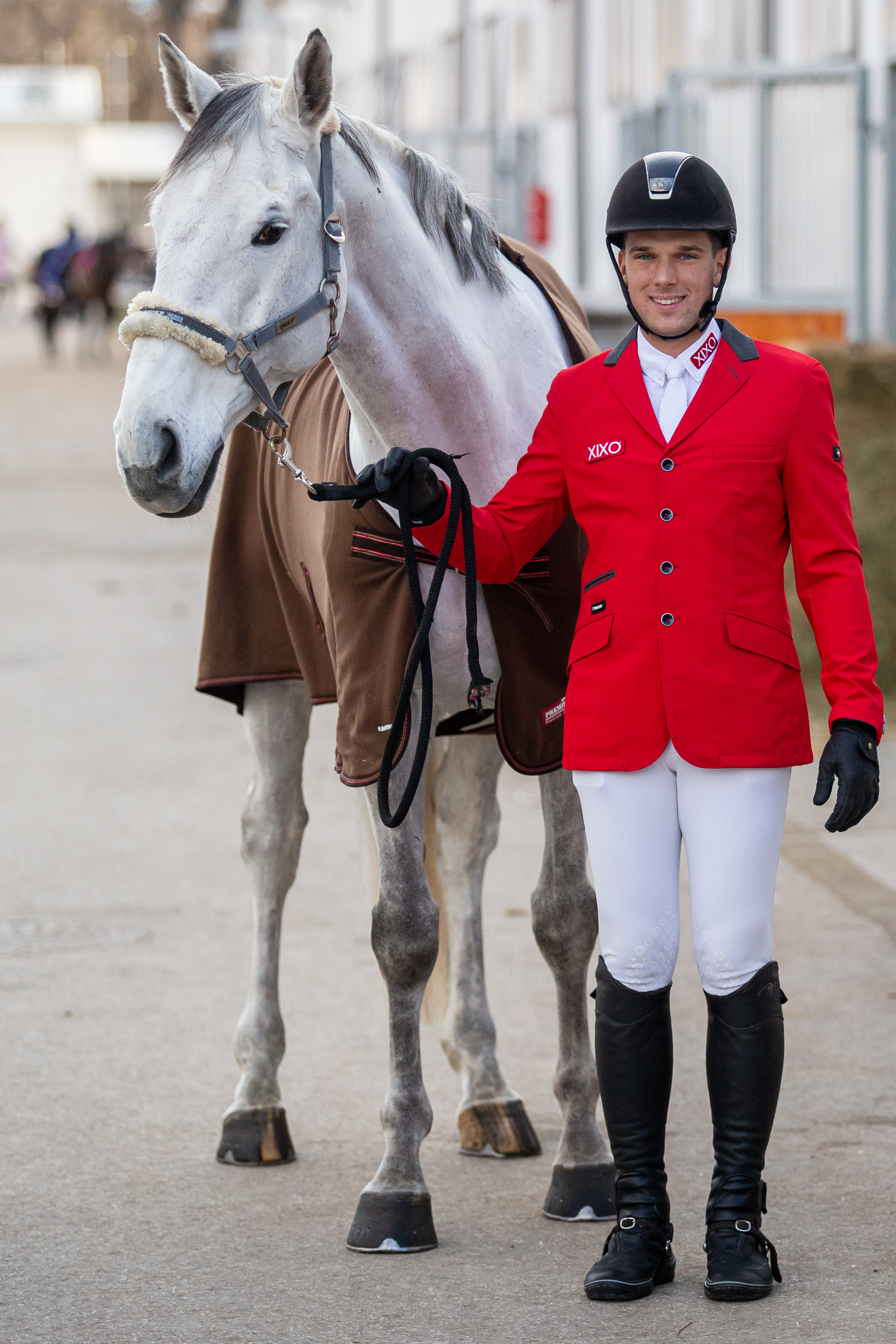 Szabó Gábor Lord Classic nevű lovával